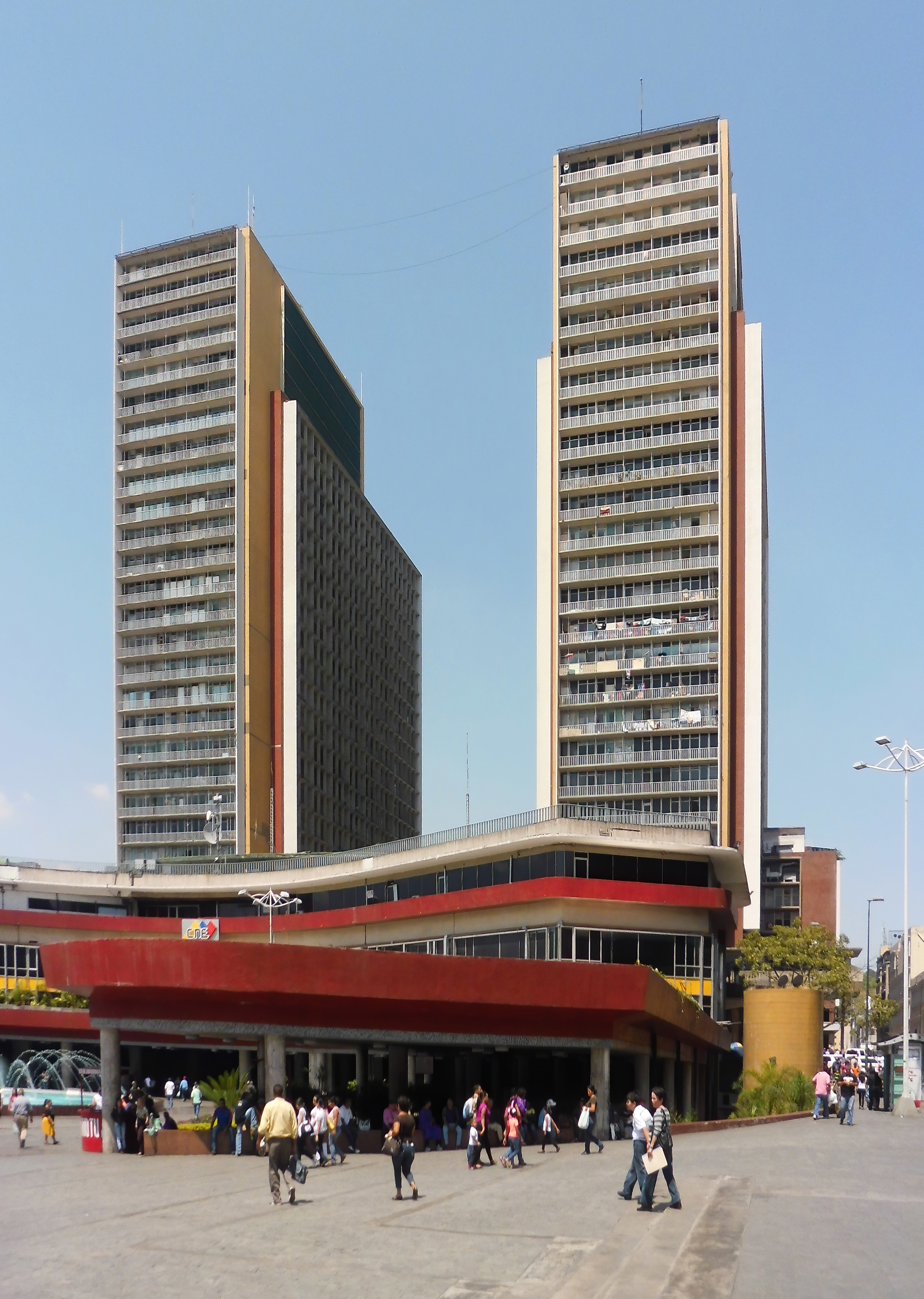 Centro Simón Bolívar en Caracas, Distrito Capital - Venezuela